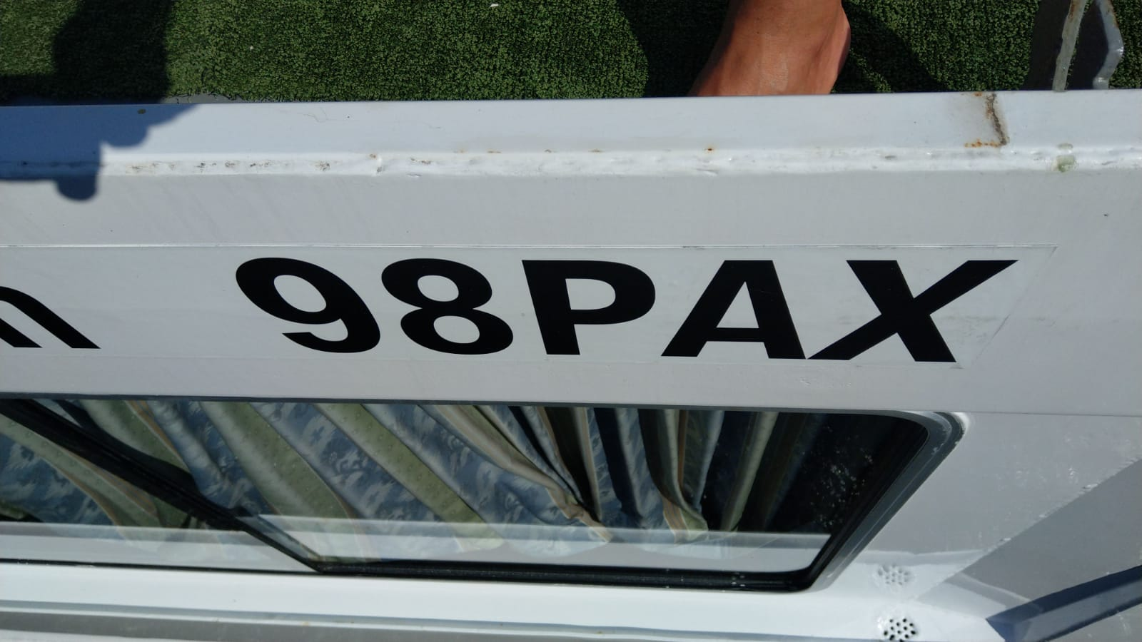 Persons approximately, oft als PAX abgekürzt, ist eine Hilfsmaßeinheit für die Anzahl von Passagieren. Sie wird vor allem von Schifffahrtsgesellschaften, Fluggesellschaften und in der Hotellerie verwendet.